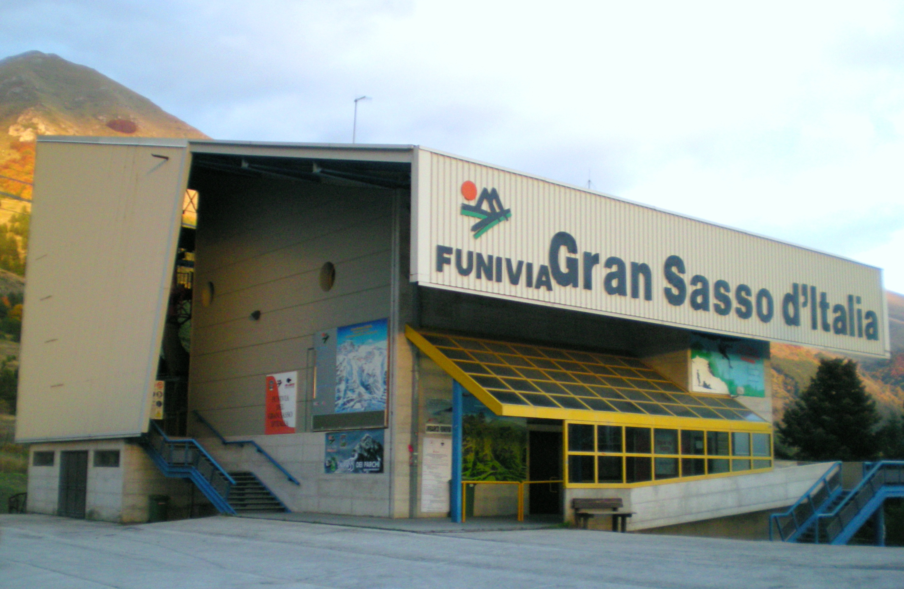 Stazione di valle della Funivia del Gran Sasso d'Italia in località Fonte Cerreto (L'Aquila)